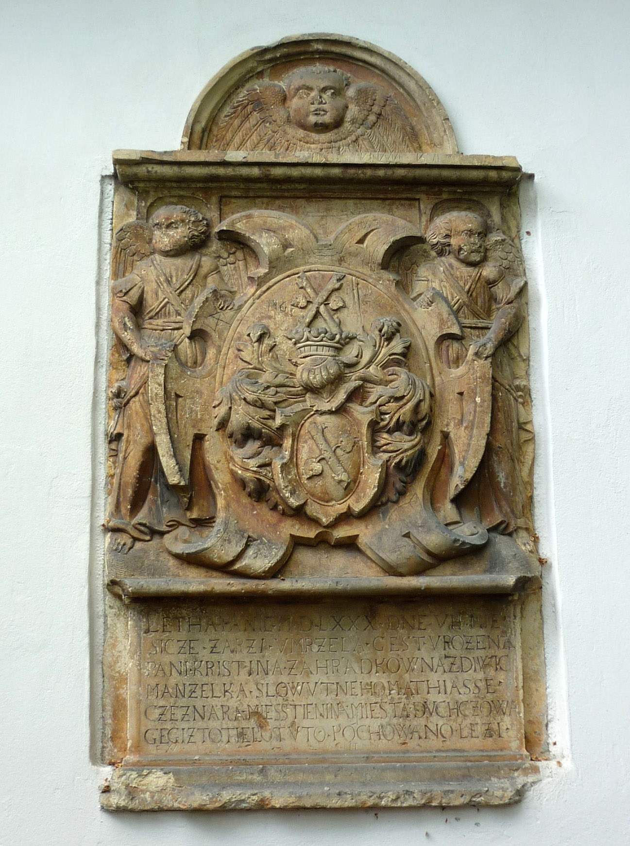 Epitaph an der Kirche der Hl. Peter und Paul in Bilin (Bílina) in Nordböhmen